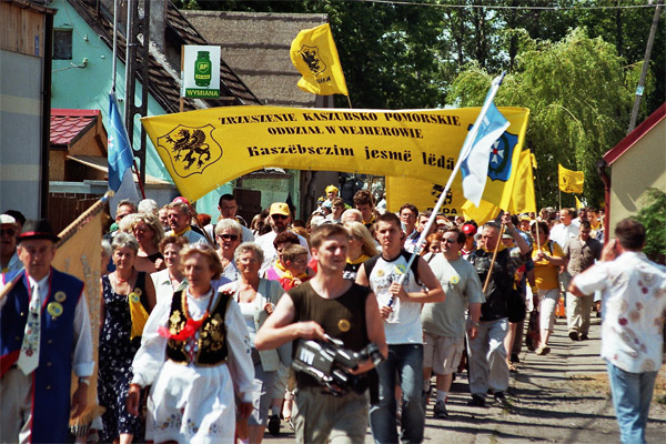 Zjazd Kaszubów, Łeba 2005. Przemarsz Powiatu wejherowskiego. Kaszëbsczi: Zéńdzenié Kaszëbów w Lebie w 2005 r. Przemôrsz Wejrowsczégò krézu.